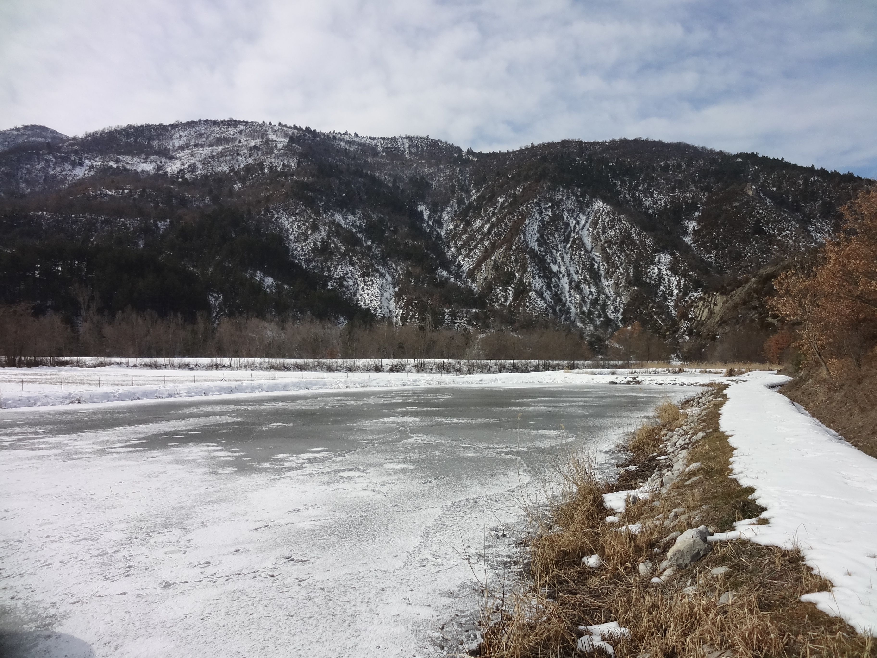 Lac de Norante, en arrière colline de la Coulette (1011 m)